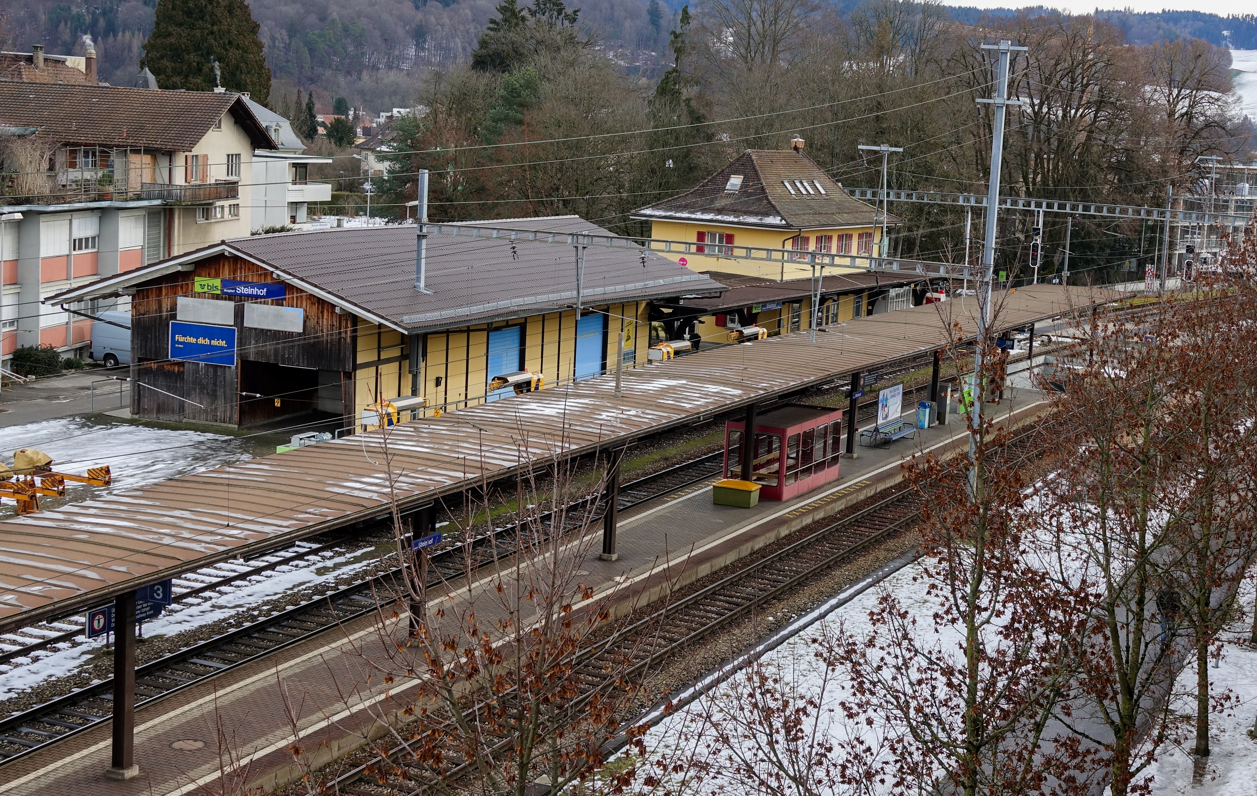 Burgdorf Steinhof station